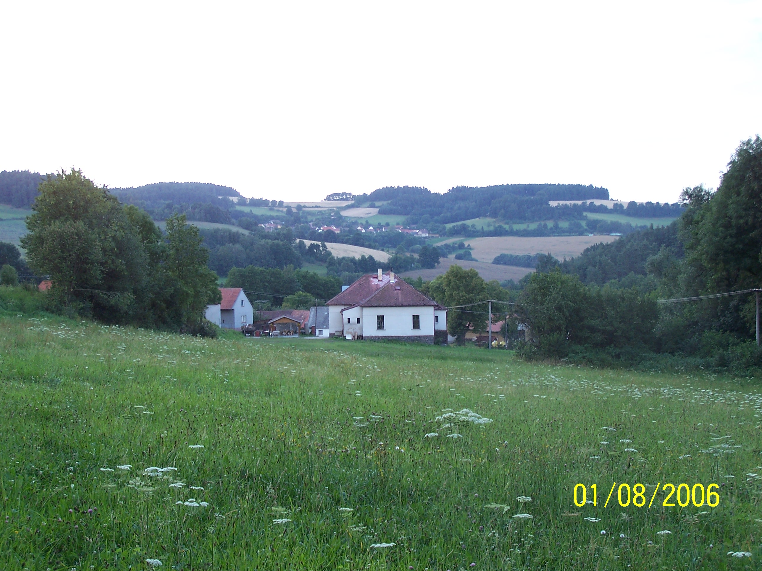 pohled na Zvotoky